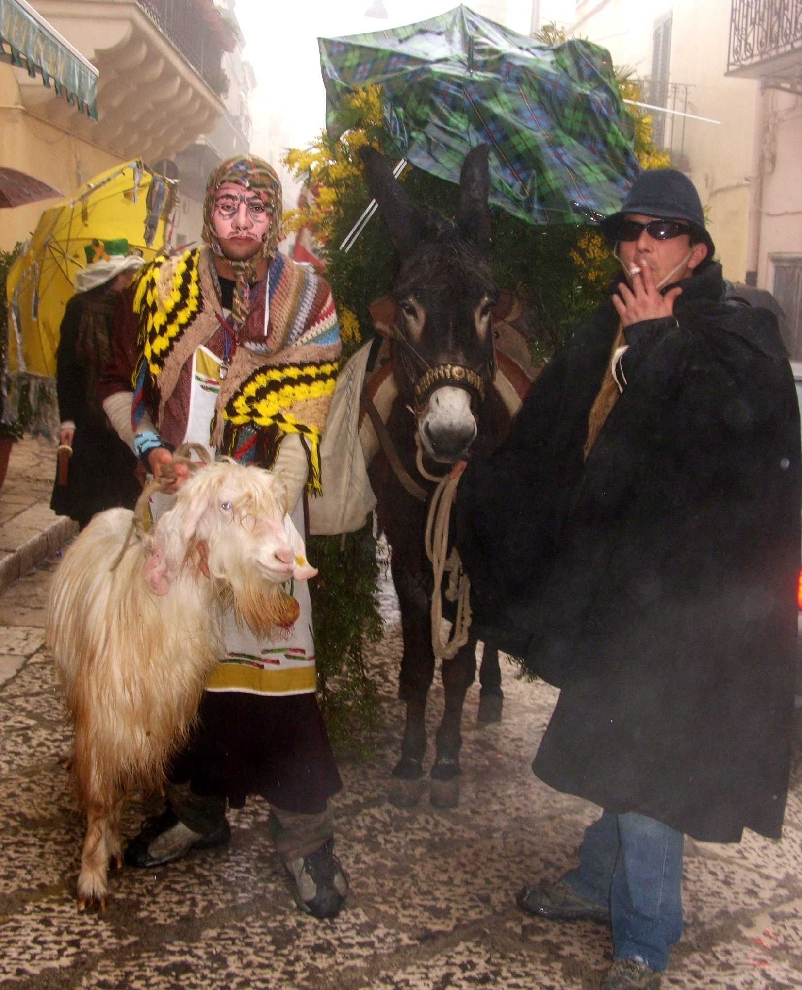 Carnevalone Montescaglioso